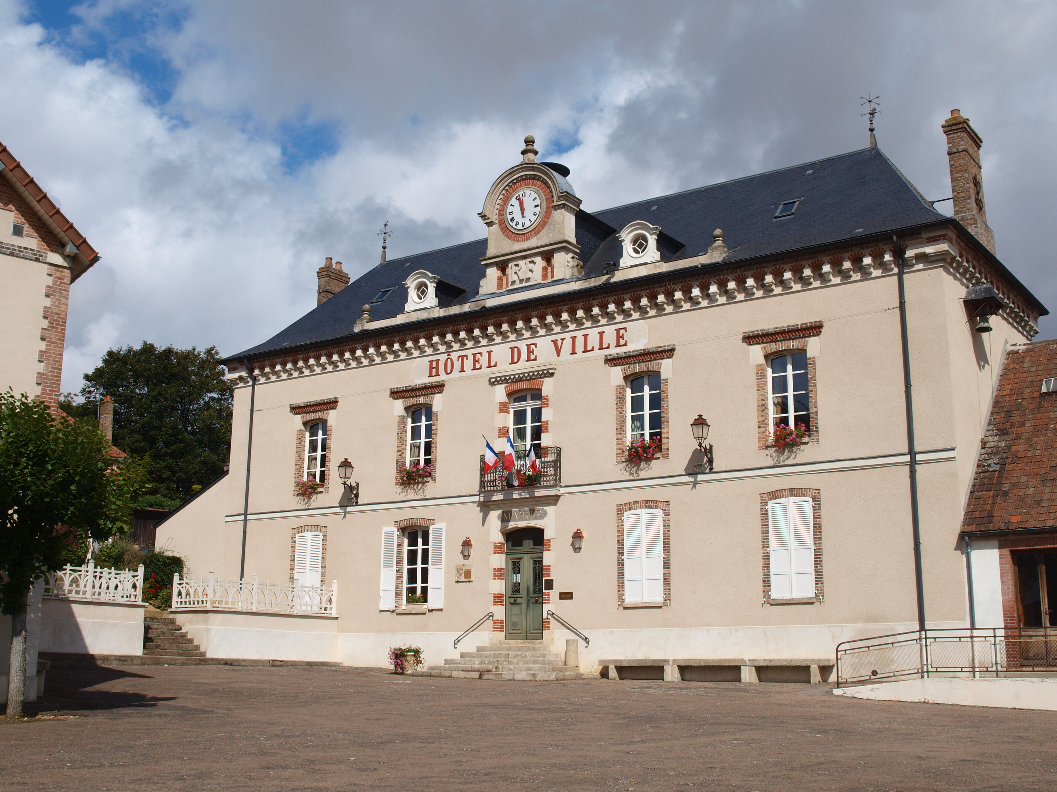 Sergines (Yonne, France) ; la mairie